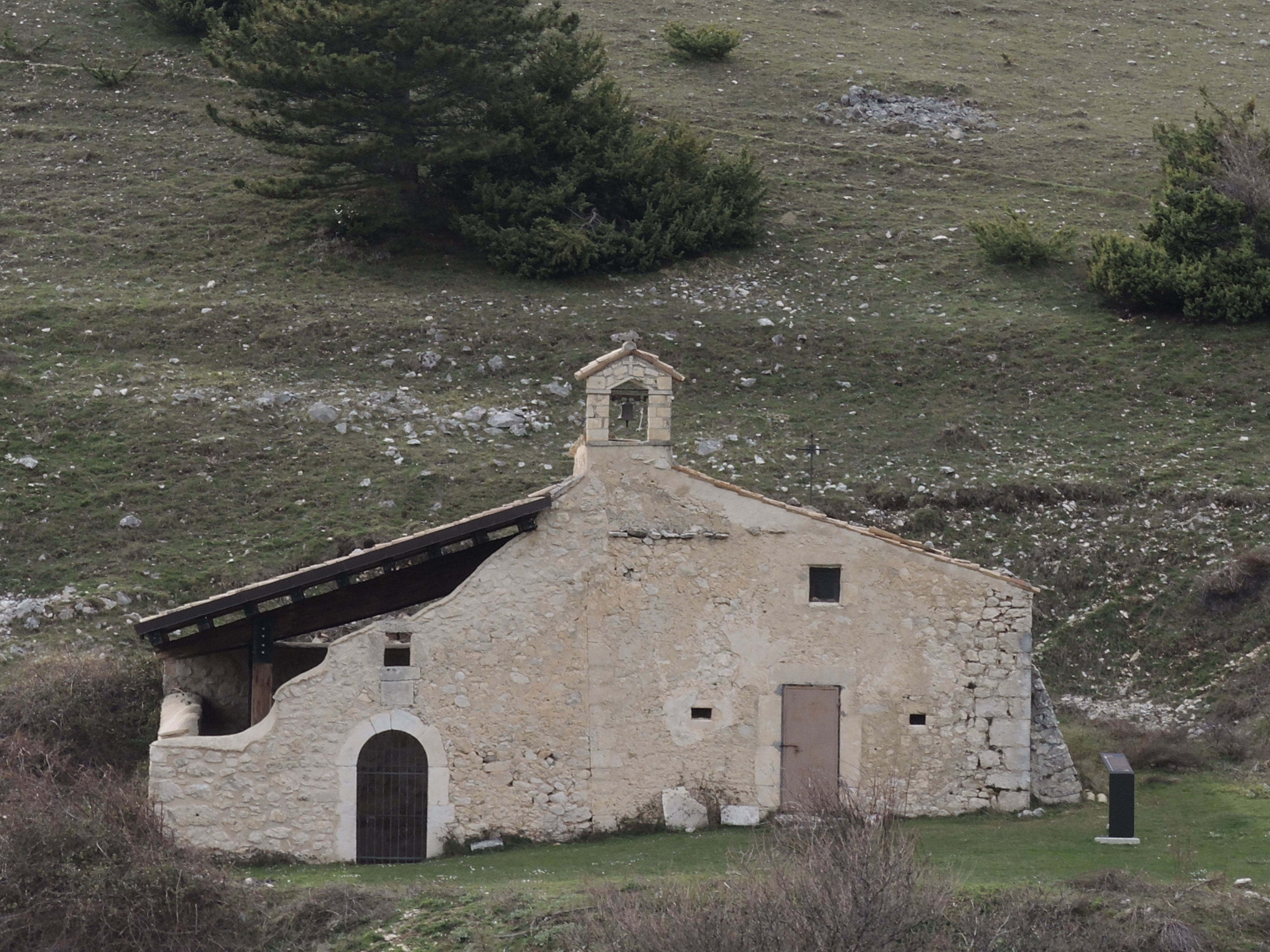 Eremo di San Germano di Pacentro